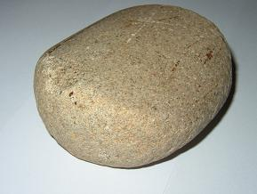 molette à grain (utilisée avec une meule dormante) - Aufferville